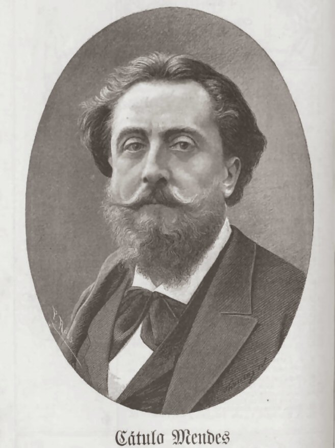 Cátulo Mendes, c. 1889